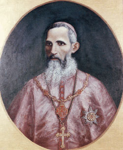 Vincenzo Bracco, lateinischer Patriarch von Jerusalem